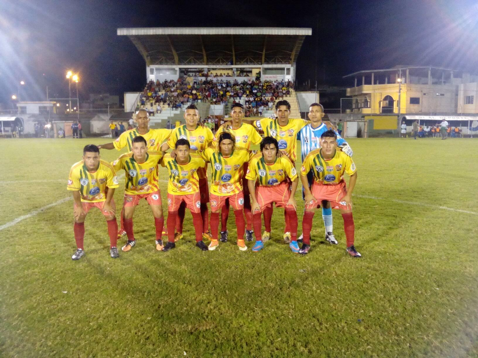 El Estadio Carlos Nieto Pesántez 2016